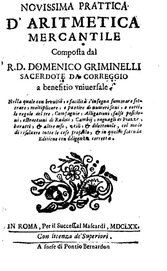 Novissima prattica d'aritmetica mercantile composta dal ... Domenico Griminelli ... Nella quale con breuità, e facilità s'insegna summare sottrare, moltiplicare, e partire di numeri sani, … & in questa seconda editione con diligentia corretta. - In Roma : per il Success. al Mascardi. A spese di Pontio Bernardon, 1670. - [8], 431, [1] p. ; 8º .